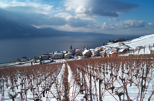 Dorf Rivaz im Distrikt Lavaux-Oron des Kantons Waadt in der Schweiz; mit Genfer See im Hintergrund.